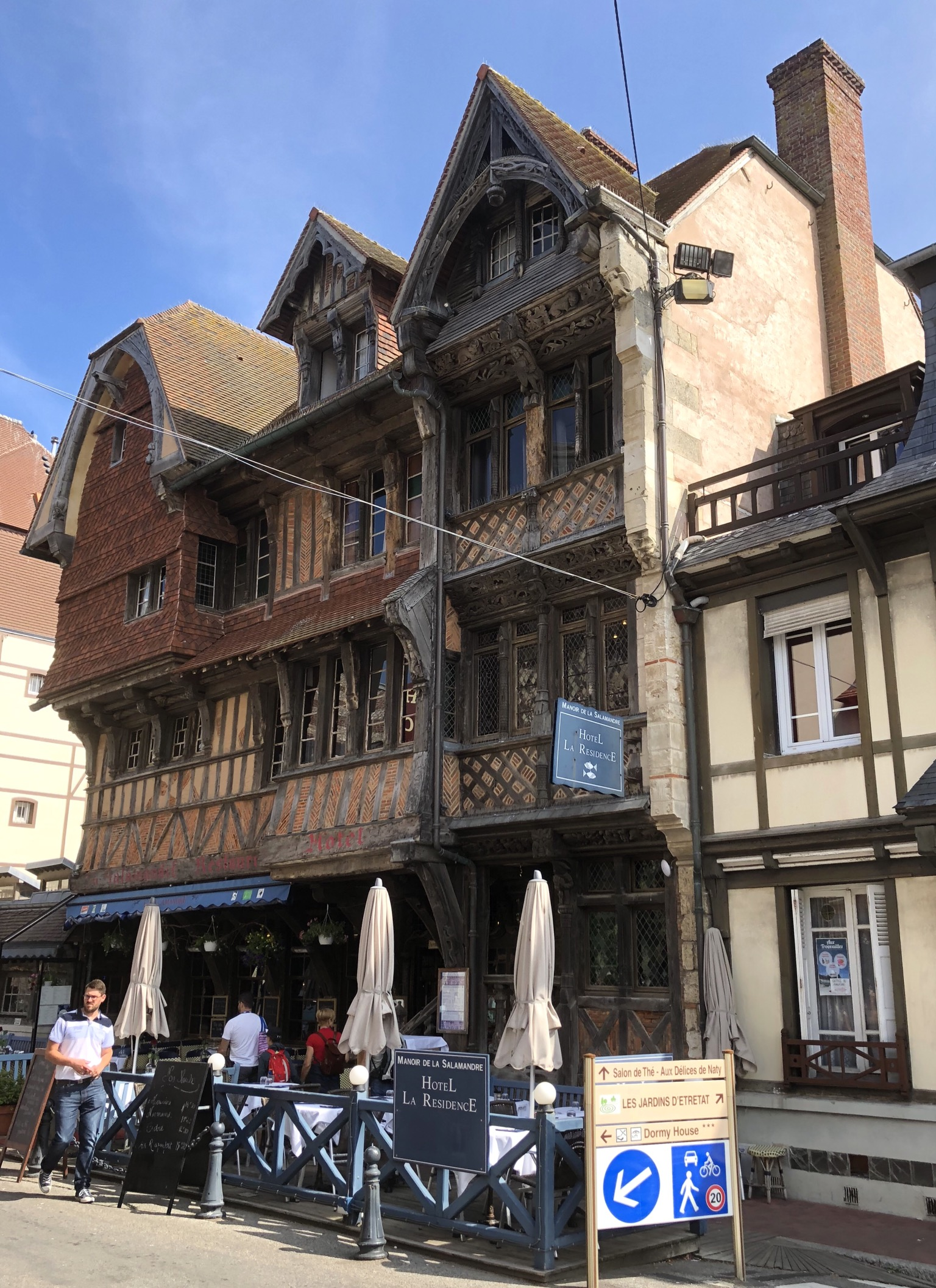 Hotel Salamander in Etretat